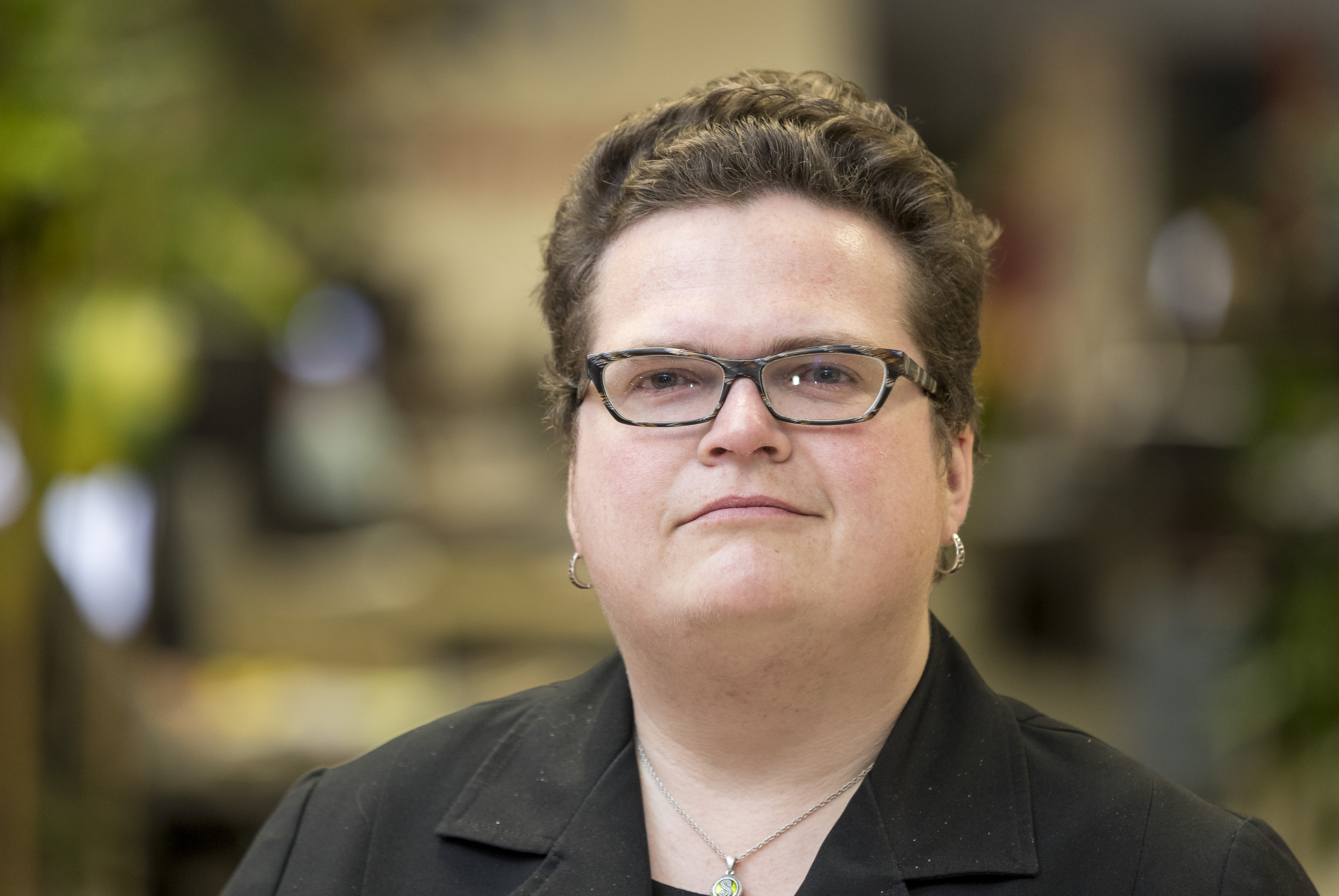 Kadri Paas